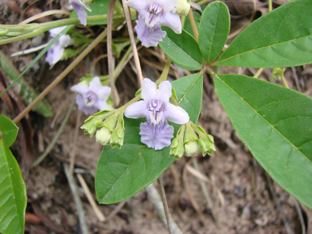 Vitex megapotamica - VERBENACEAE Praia do Mo�ambique - Florian�polis - SC - Brasil